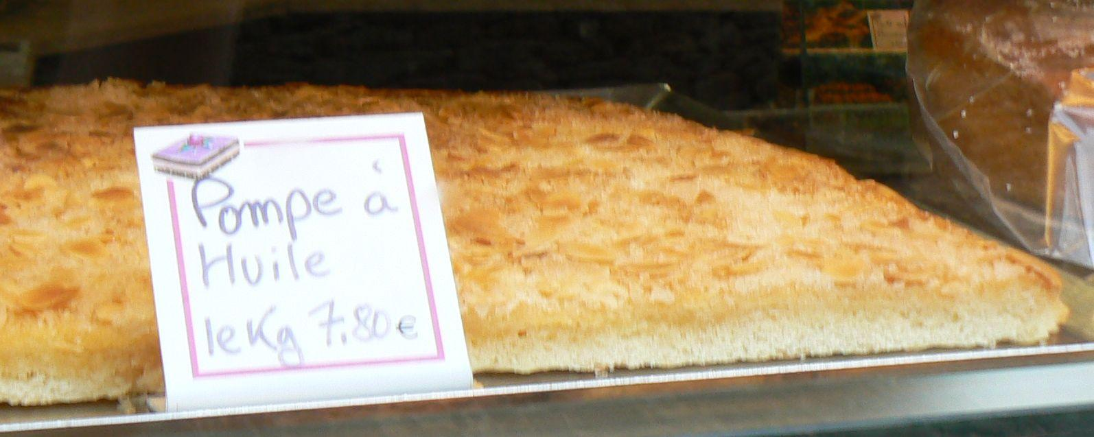 La pompa d'oli d'oliva és una mena de coca dolça occitana